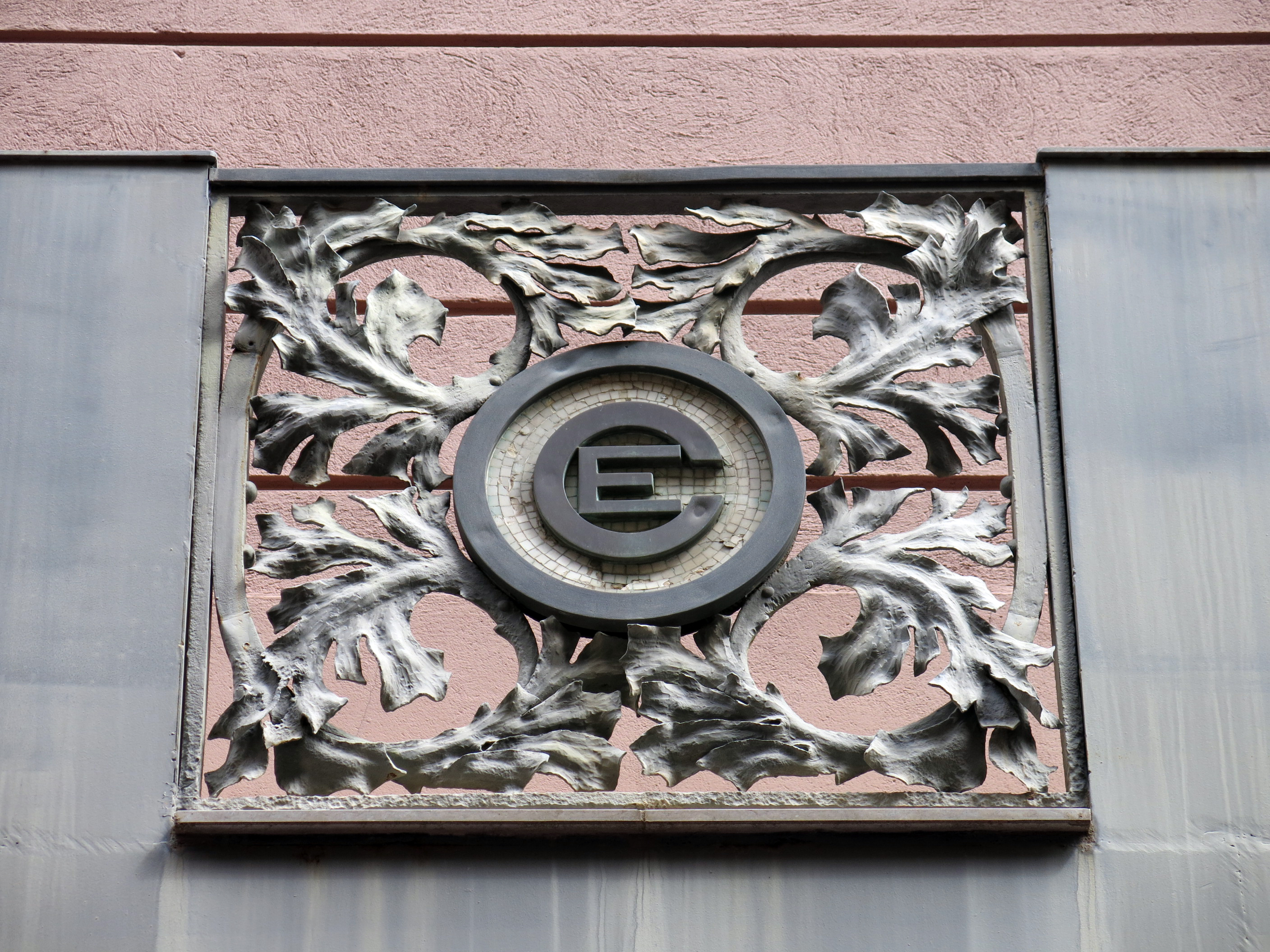 Edifici del Círcol Egarenc (Terrassa)